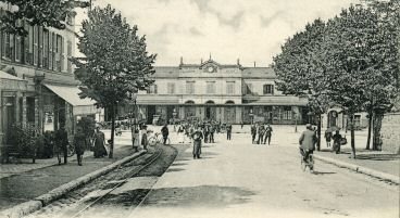 Gare de Chartres, Eure-et-Loir (France).